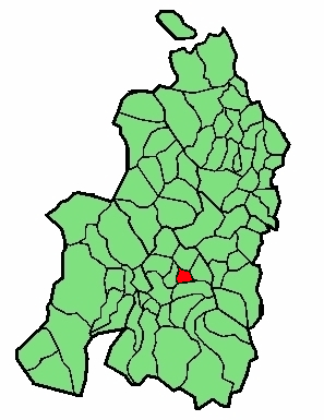 aipaturiko udalerriaren kokapena Nafarroa Beherean